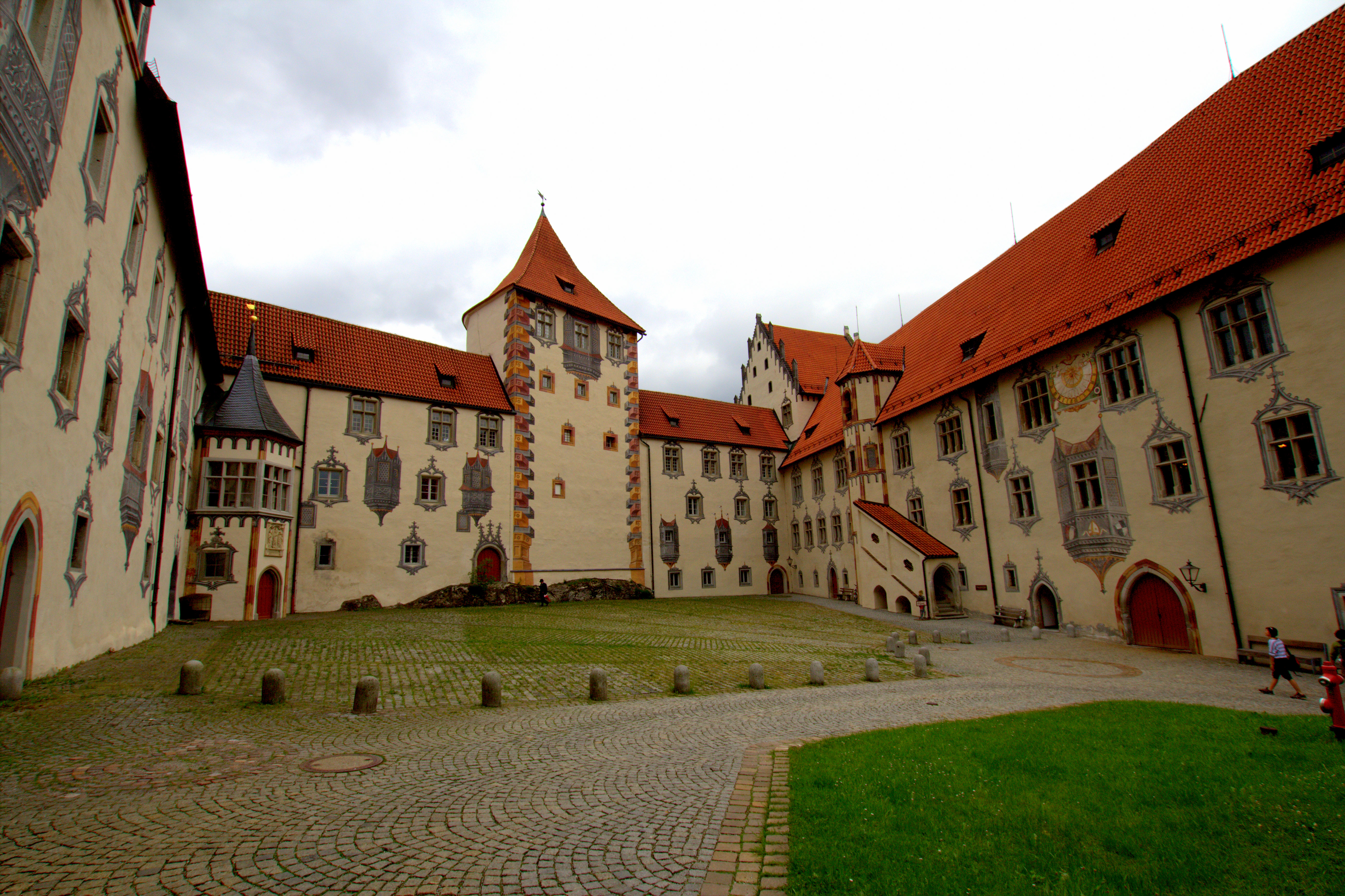 Der Innenhof des Hohen Schlosses in FüssenThis is a photograph of an architectural monument.